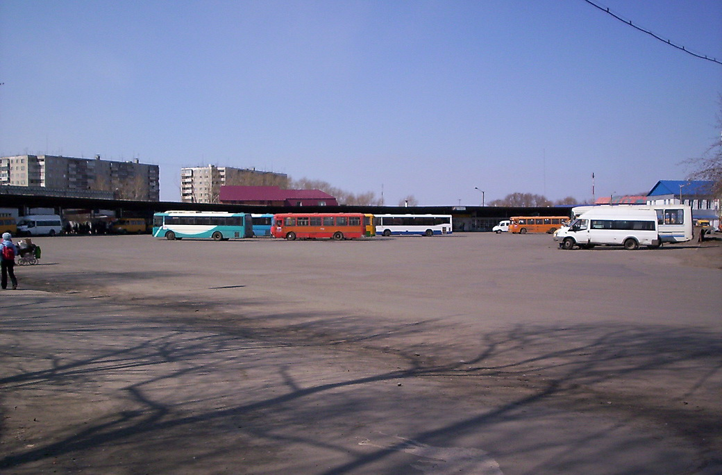 Автовокзал Копейска